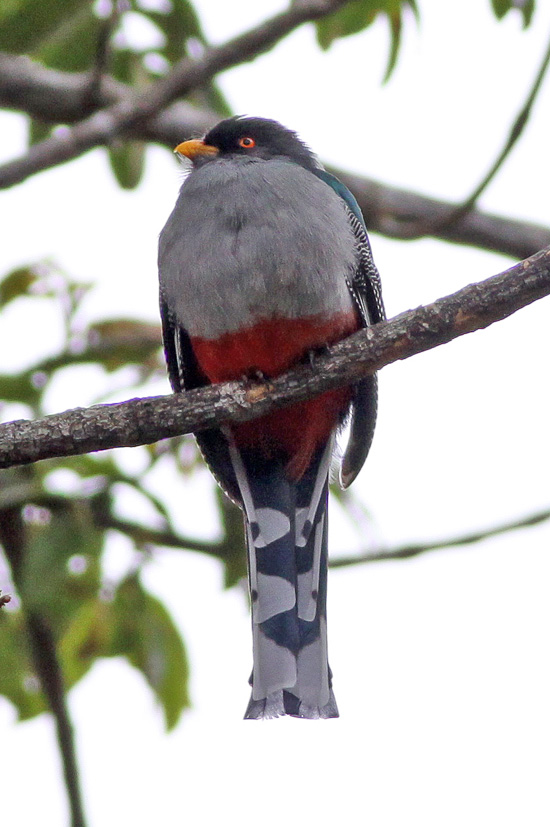 Sierra Baerucu National Park Upper reaches